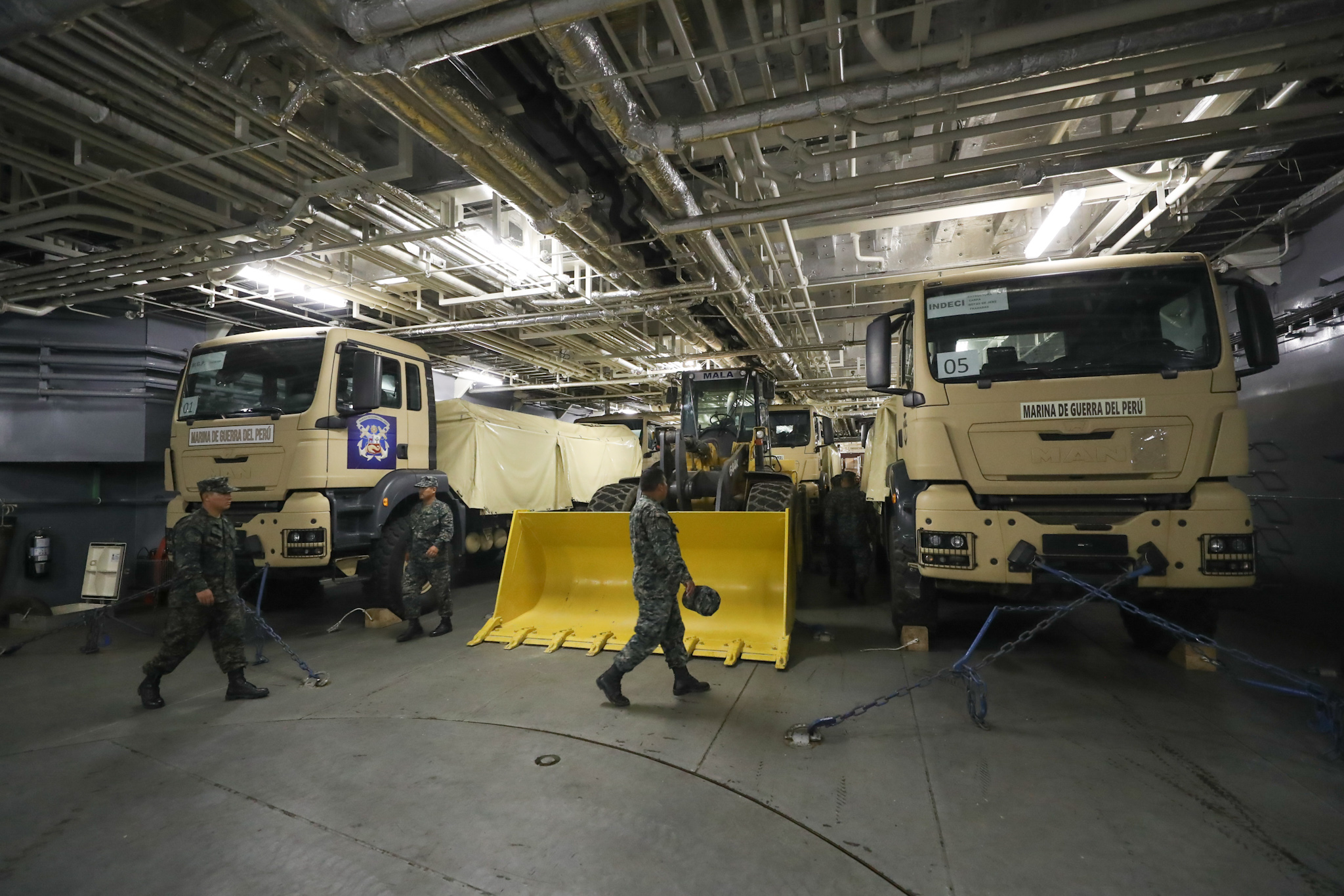 Hangar del BAP Pisco con material para atender las zonas afectadas por lluvias y desbordes de ríos.